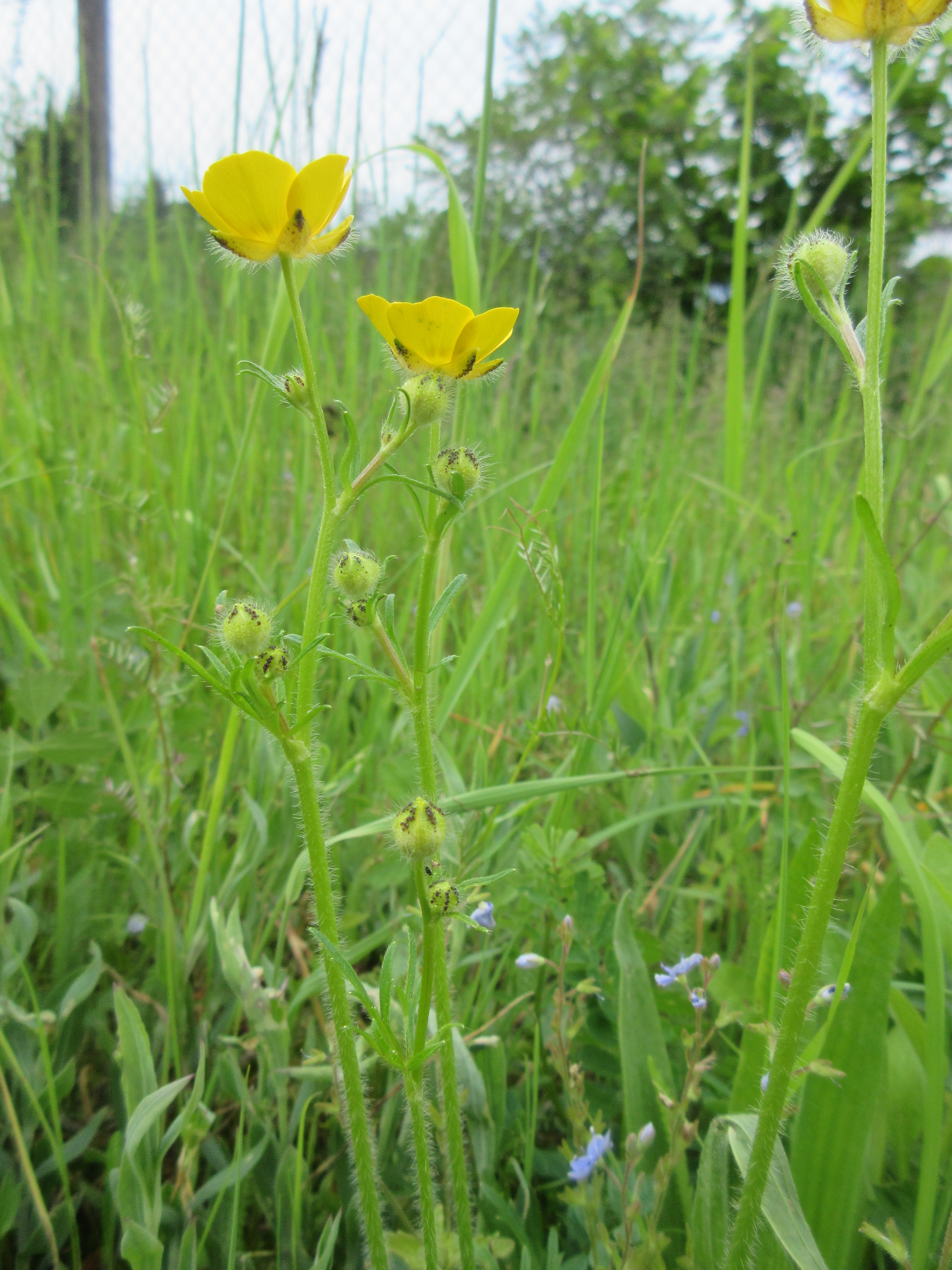 Ranunculus polyanthemos, Brno-Obřany, Czech Republic